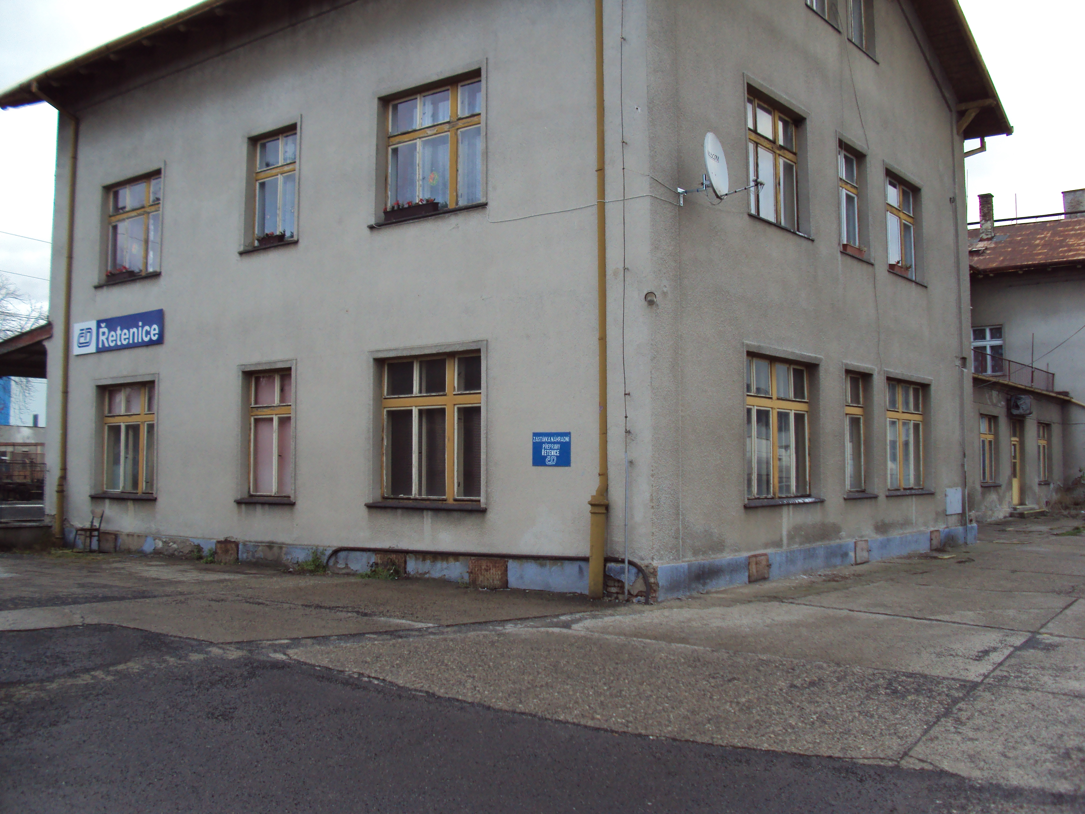 Teplice, nádraží Řetenice.